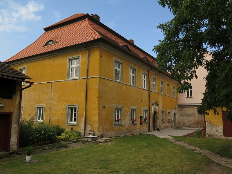 Fara, Jiráskovo náměstí 71, Kostelec nad Orlicí.